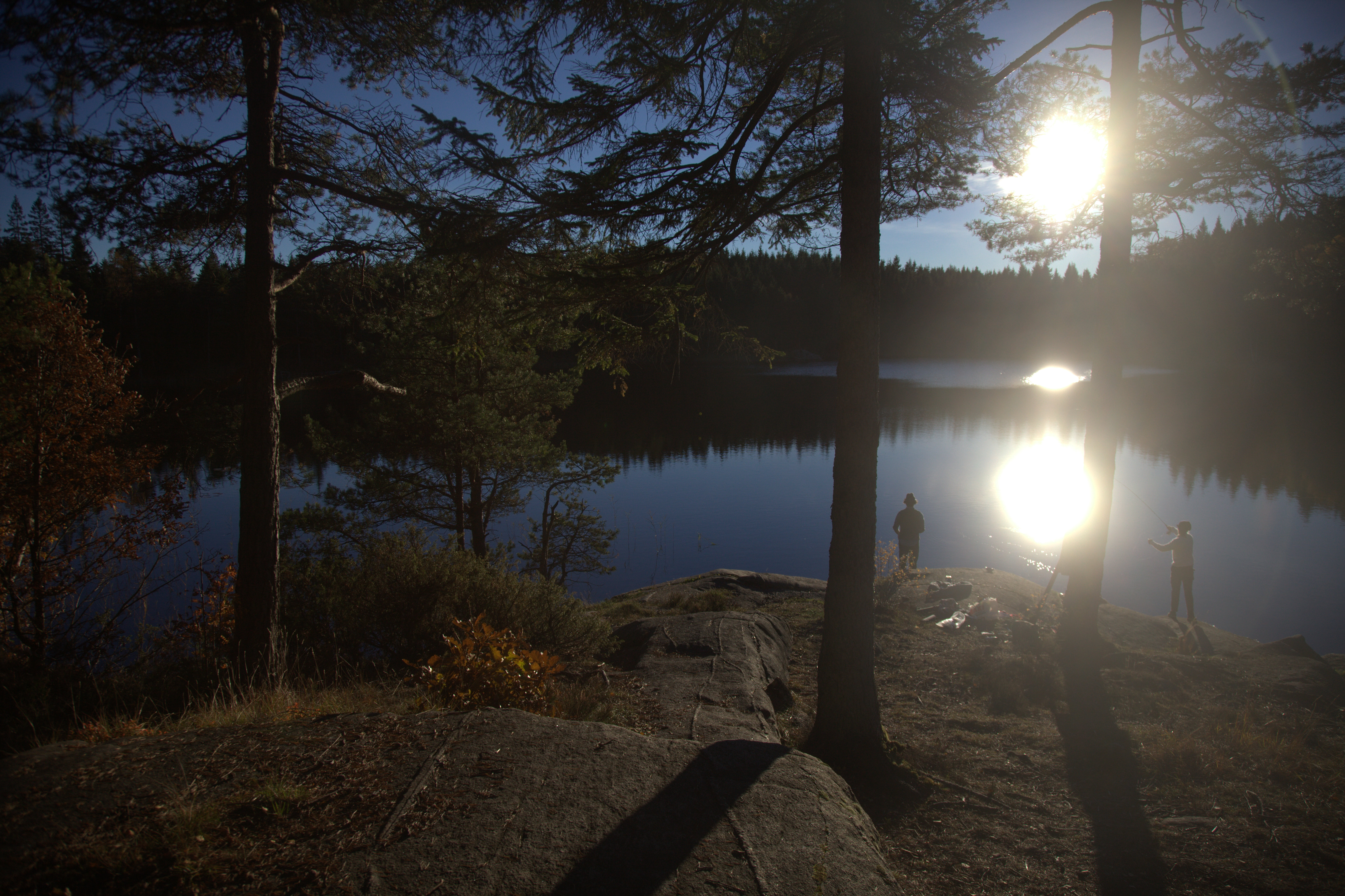 Lindesjön i Kungälvs kommun.